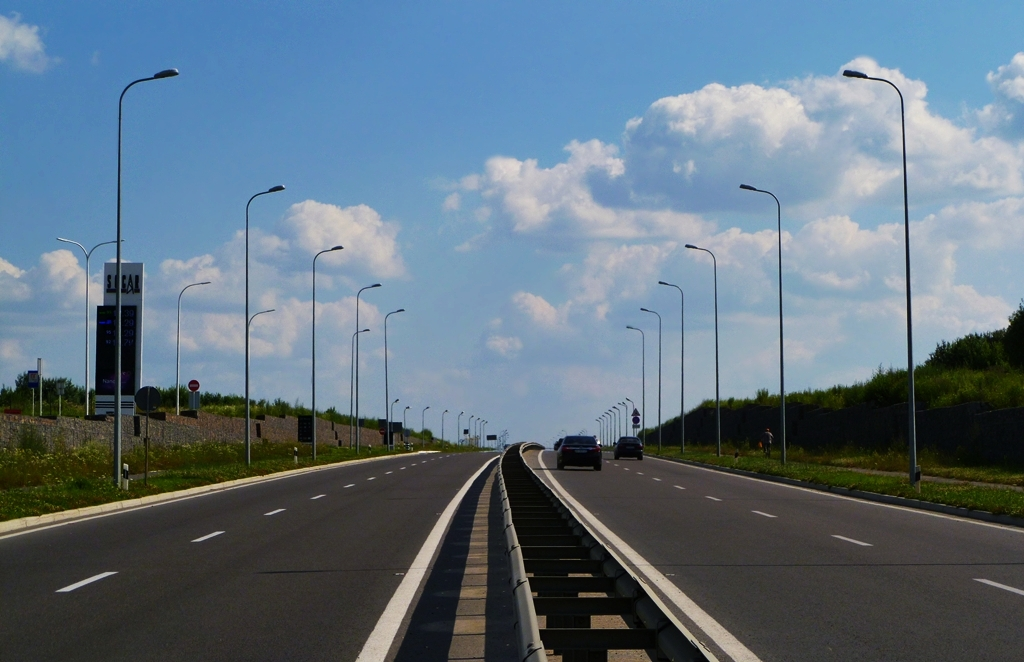 дорога у Львів